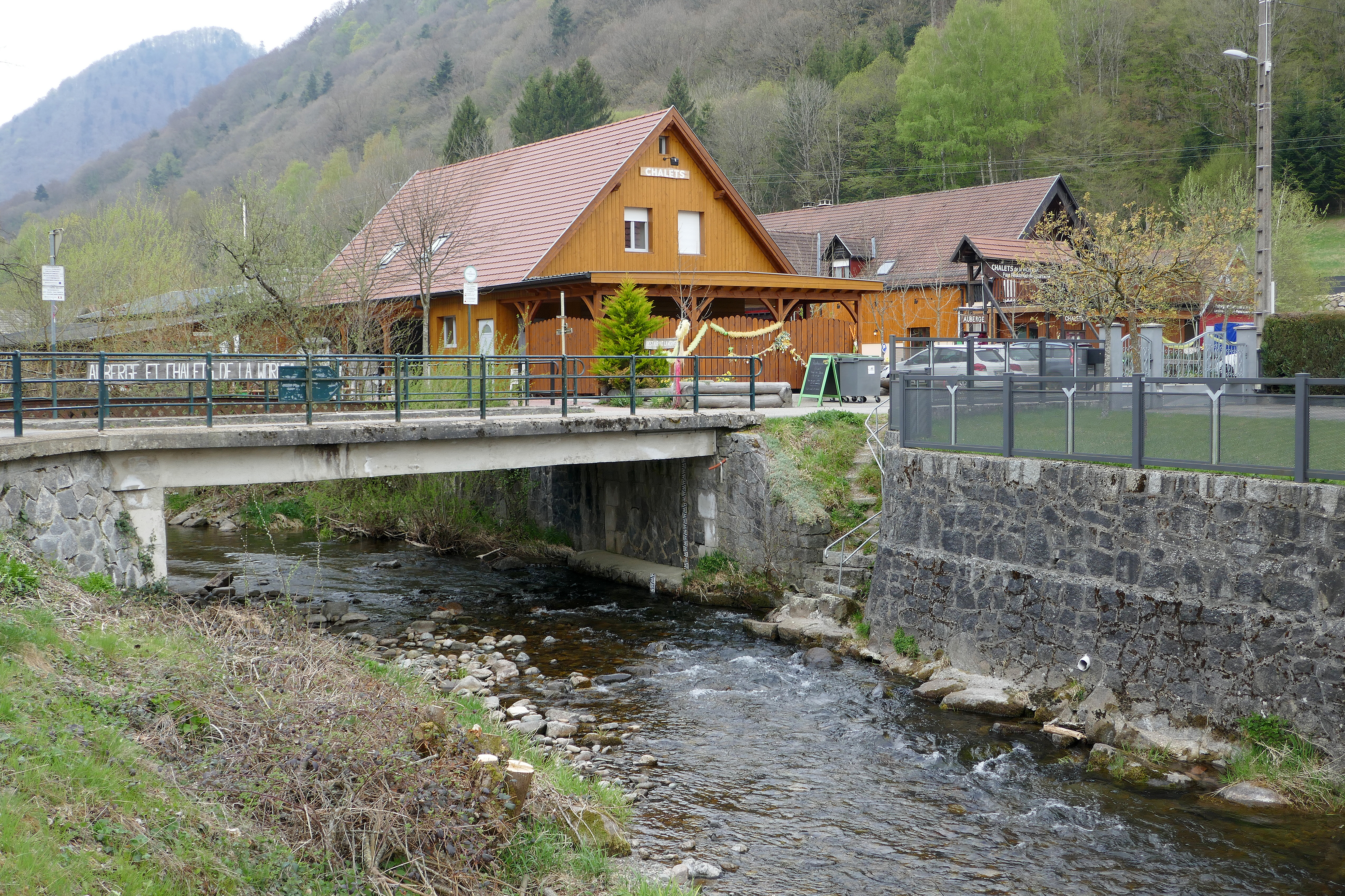 Chalets de la Wormsa (Metzeral, Haut-Rhin).